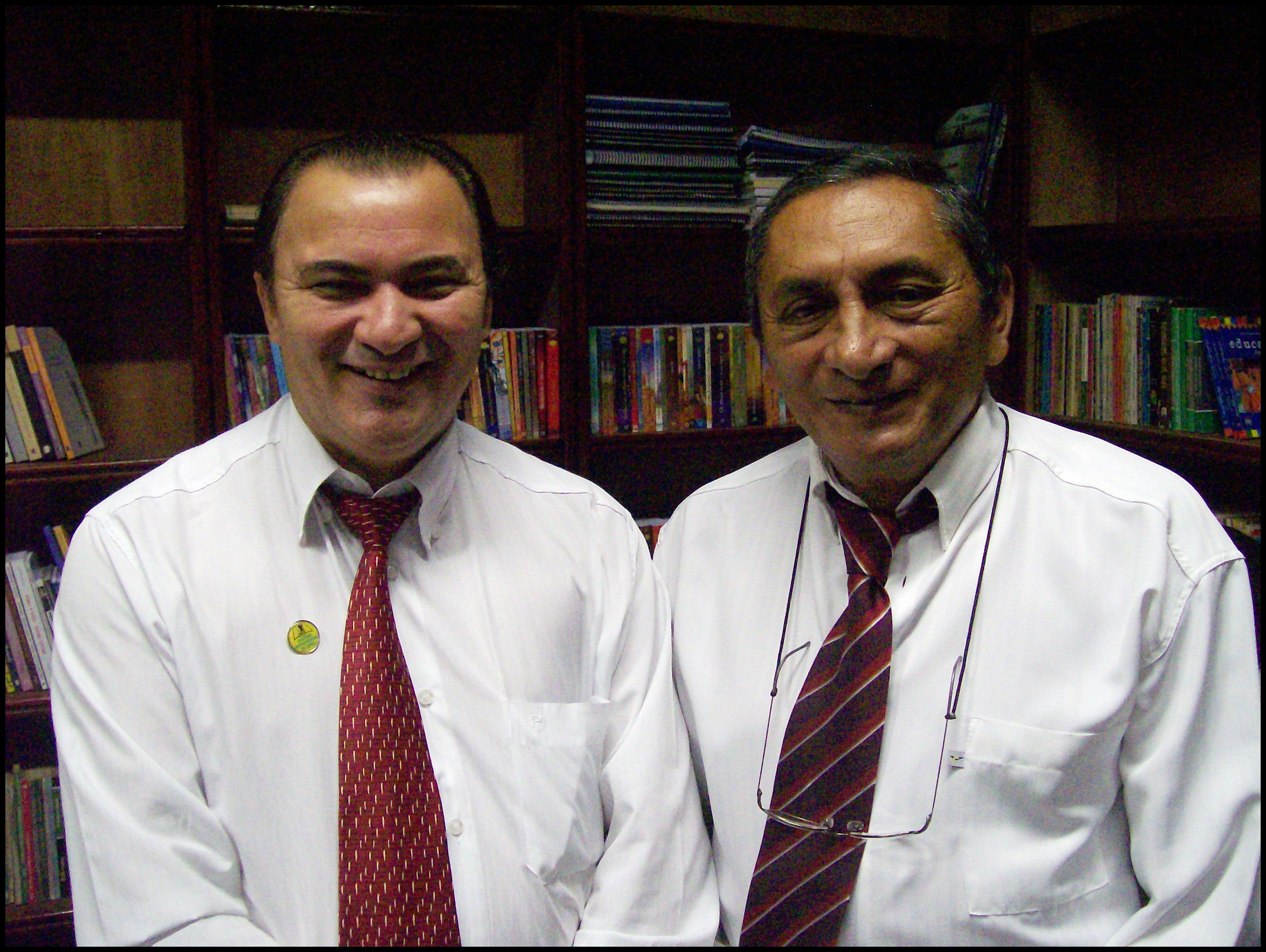 Os acadêmicos Leonildo Alves de Sousa e Arnaldo Monteiro.